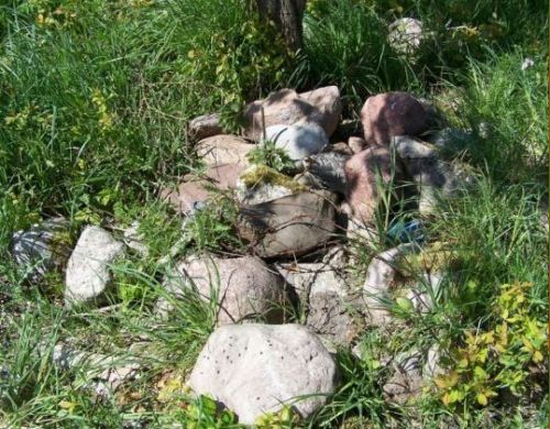 Lisia Góra] w Jasnej - resztki wieży Bismarcka.